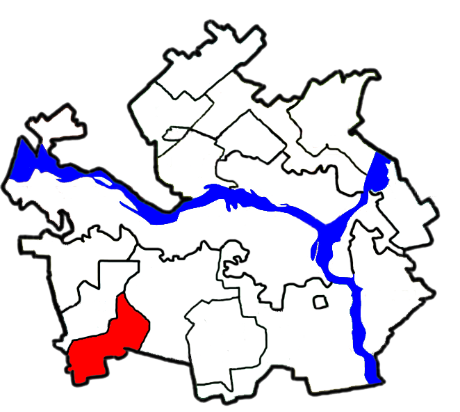 Миколаївська сільська рада, Дніпропетровський район